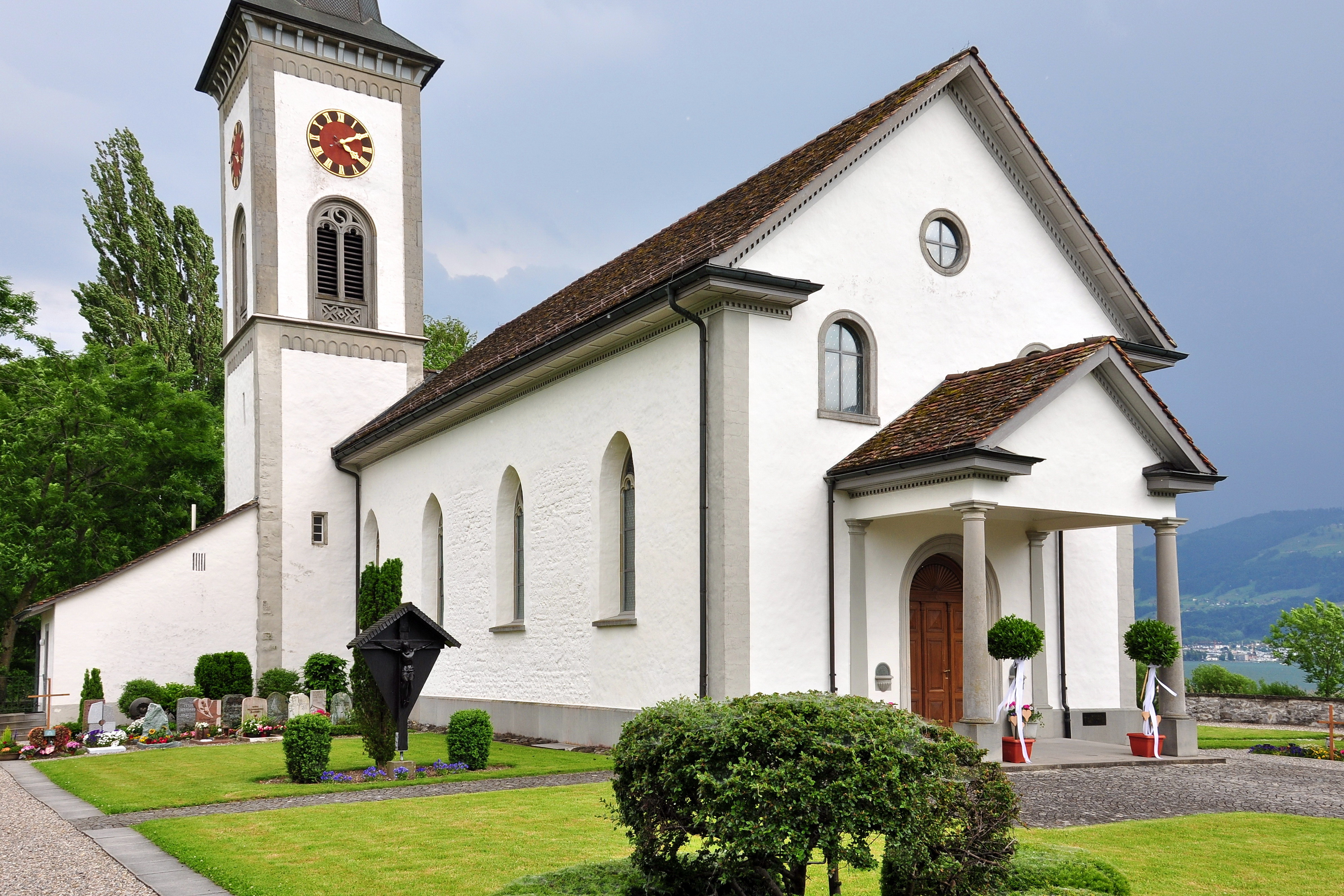 St. Martin Busskirch in Jona (SG) on Obersee (upper Lake Zürich) shore